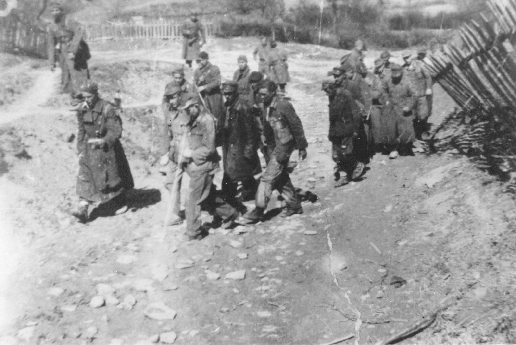 Zarobljeni ustaše i Nemci za vreme borbi u Banja Luci, septembra 1944.